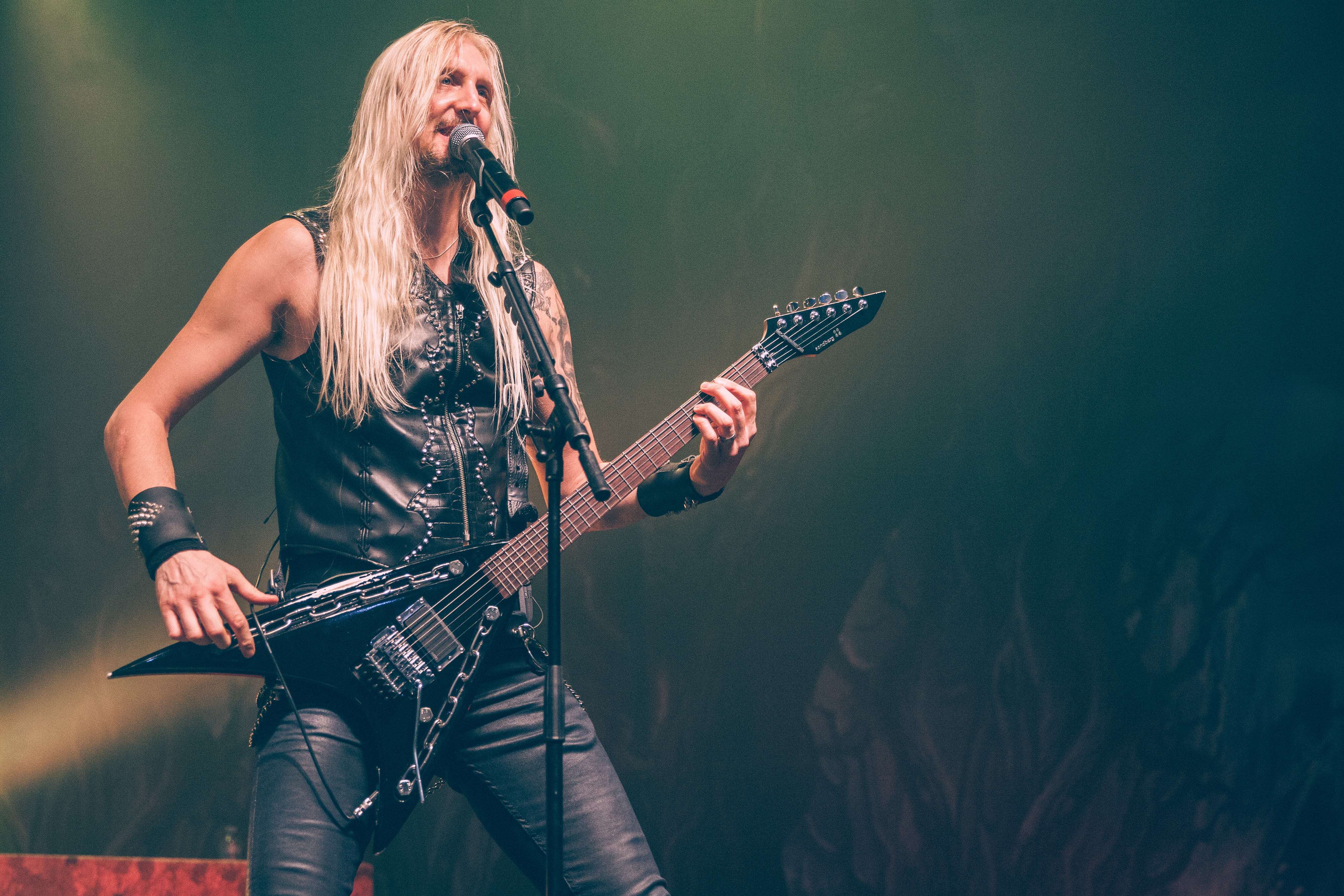 Hammerfall at Ruhrpott Metal Meeting (2015), Turbinenhalle, Oberhausen (DEU) /// leokreissig.de for Wikimedia Commons